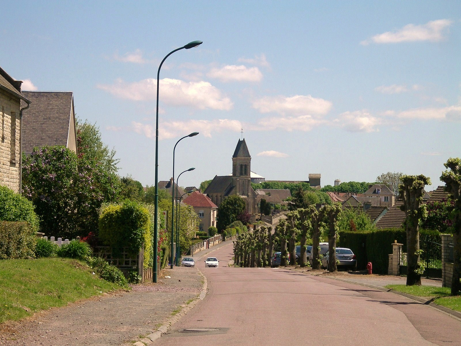 Esquay-Notre-Dame (Calvados)